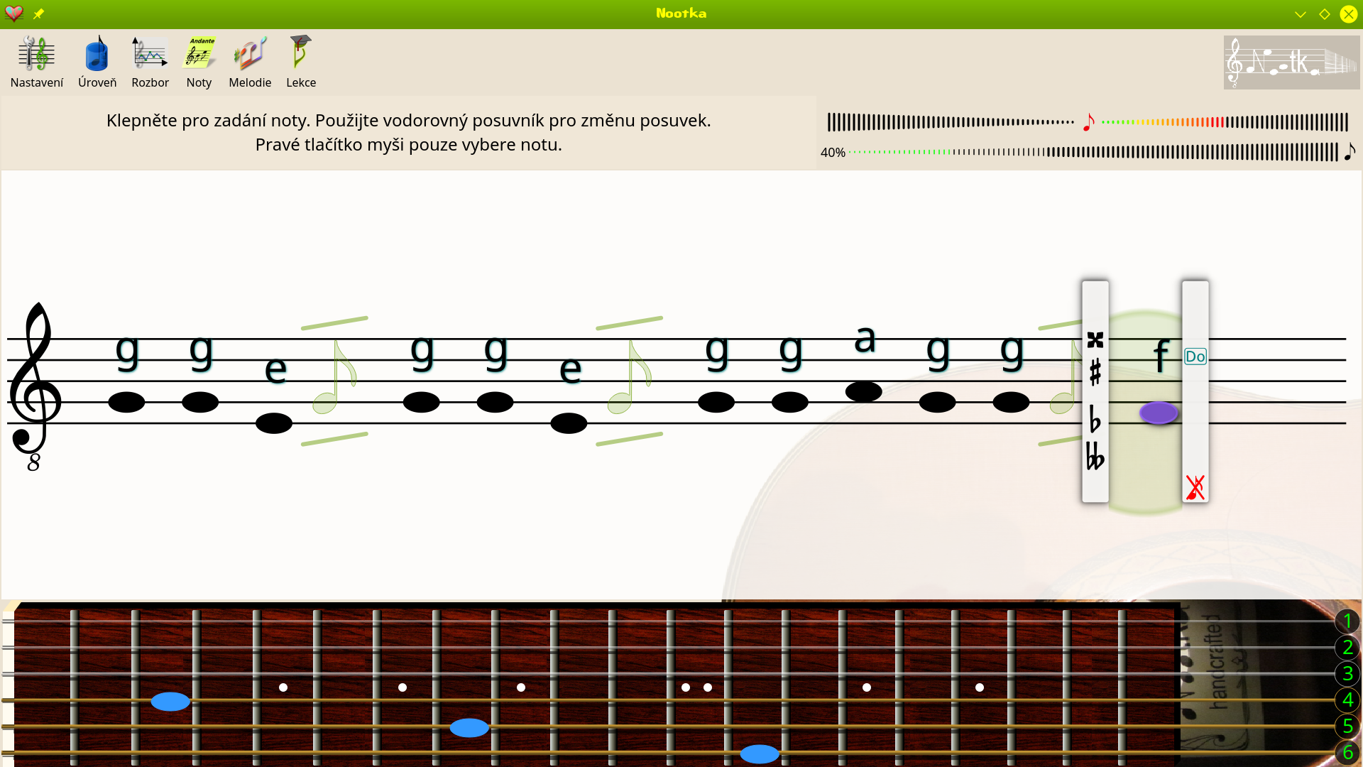 Hlavní okno